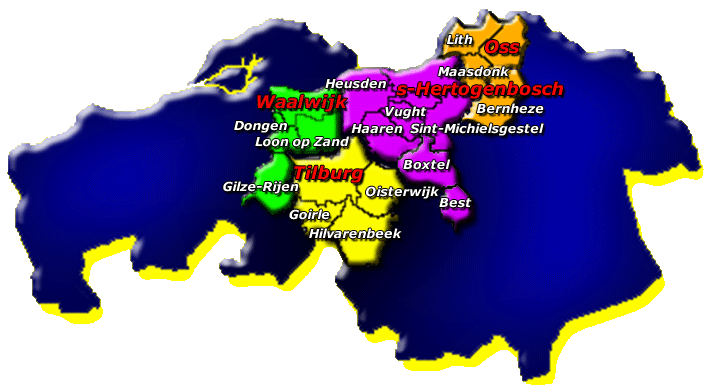 Officiele editiekaart van Regio TV - Zelfgemaakt door M.TRUM